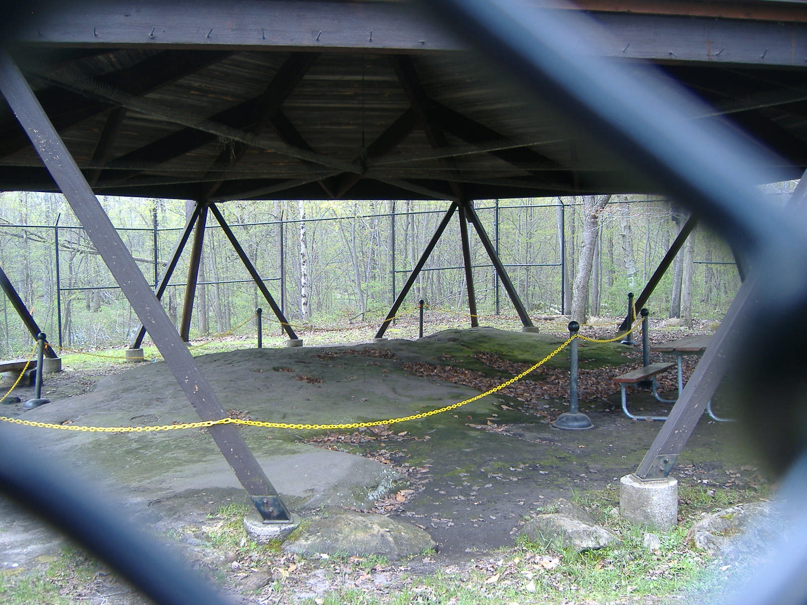 Sanilac Petroglyphs